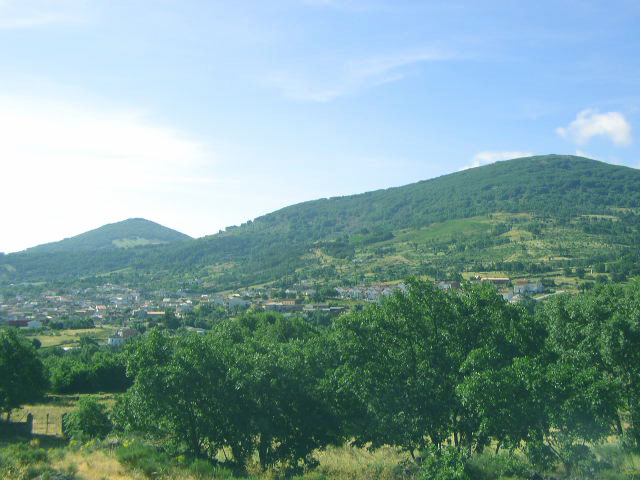 Vista de San Pablo de los Montes (España)